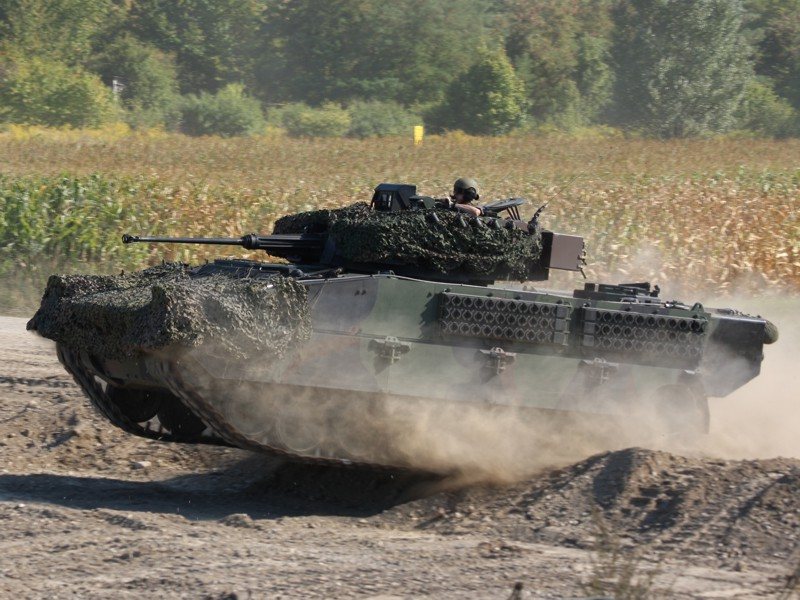 (c) - Schützenpanzer Ulan. Weitere Infos